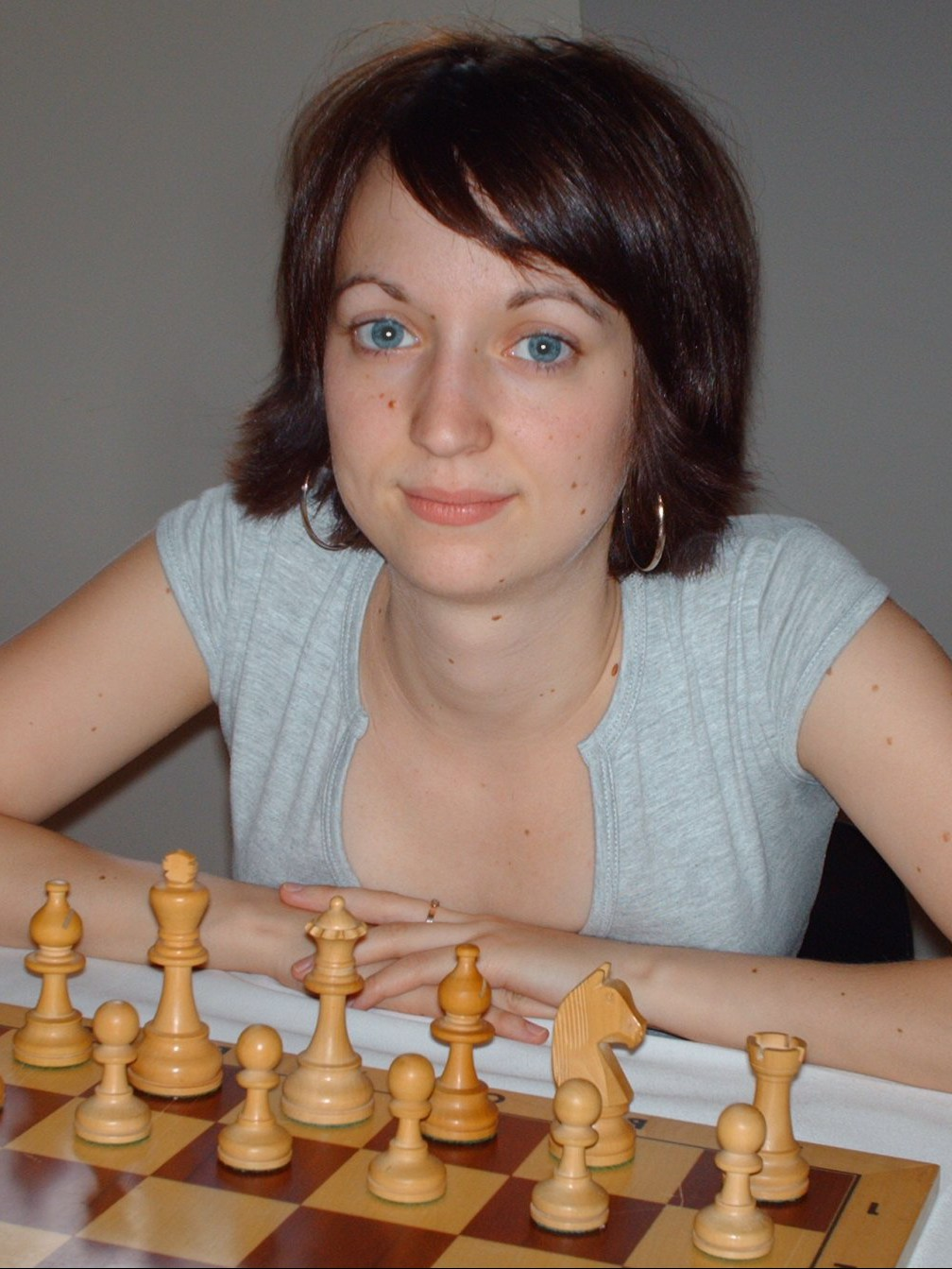 Elisabeth Pähtz am 16. Juni 2007 beim Schachfestival im Jüdischen Museum Berlin